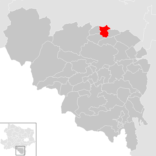 Bezirk Neunkirchen